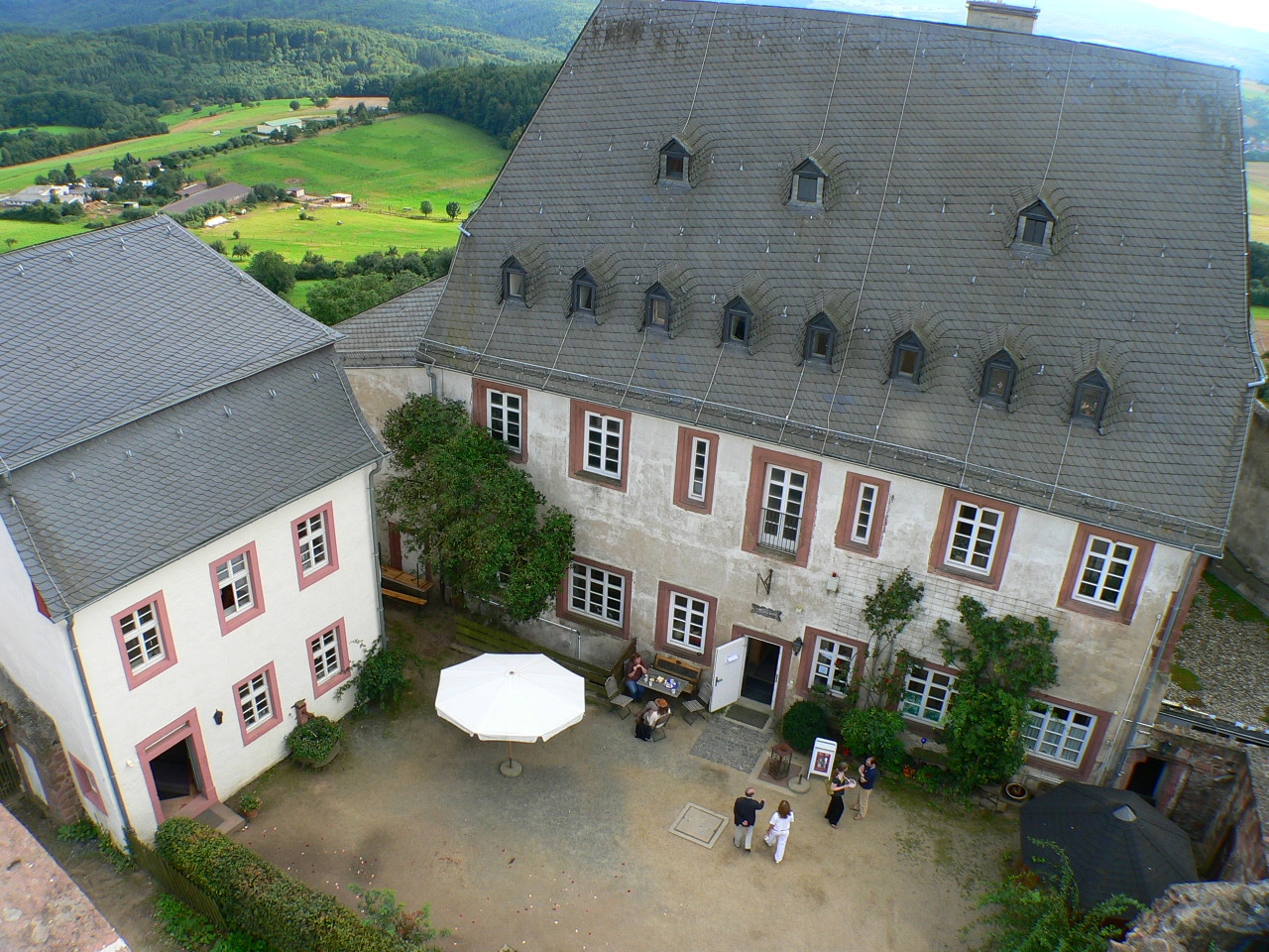 Veste Otzberg - Palas (rechts) und Korporalshaus (links)